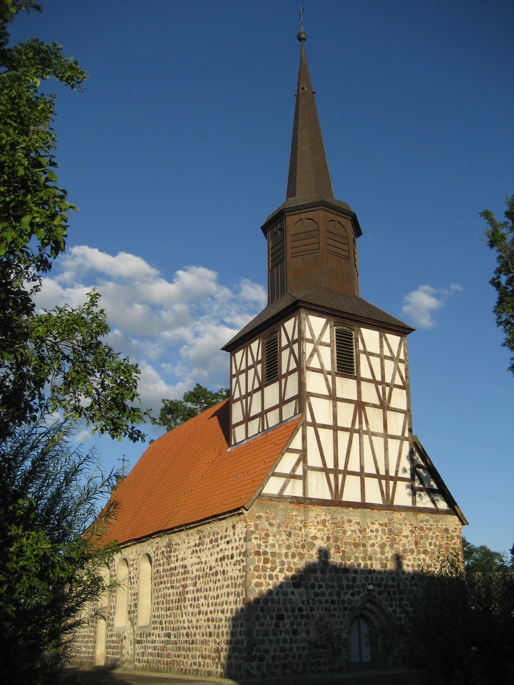 Kirche Rossow aus Blickrichtung Westen.